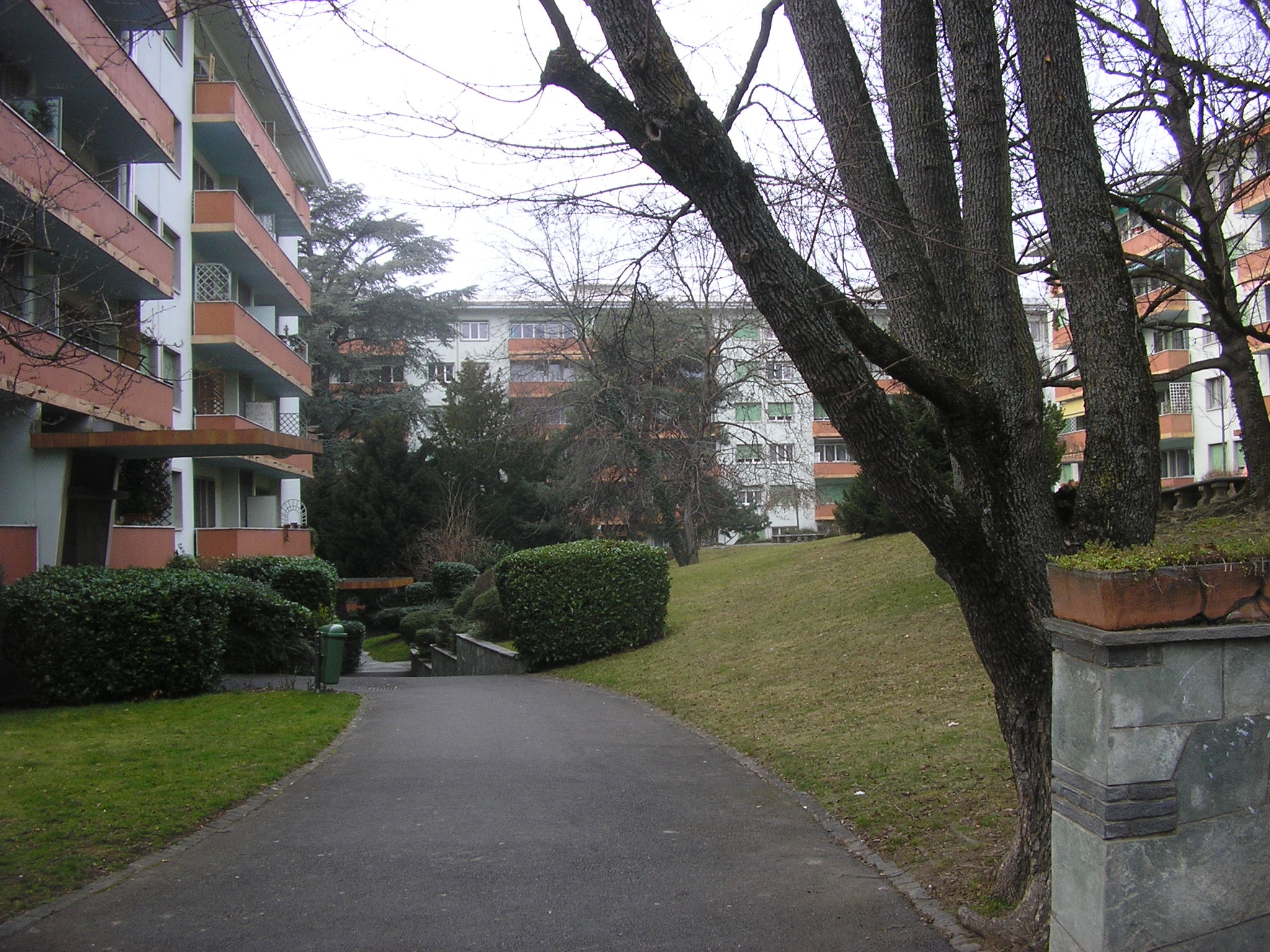 Vue générale du parc « Dinu Lipatti » à Chêne-Bourg, canton de Genève.